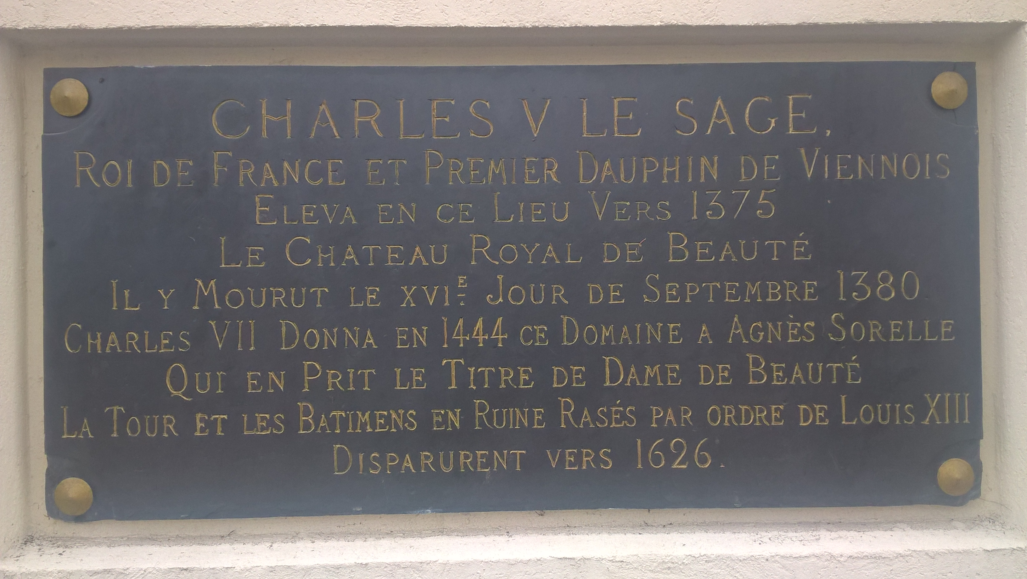 Plaque marquant l'emplacement du château de Beauté, au 7 avenue de Watteau, Nogent-sur-Marne.